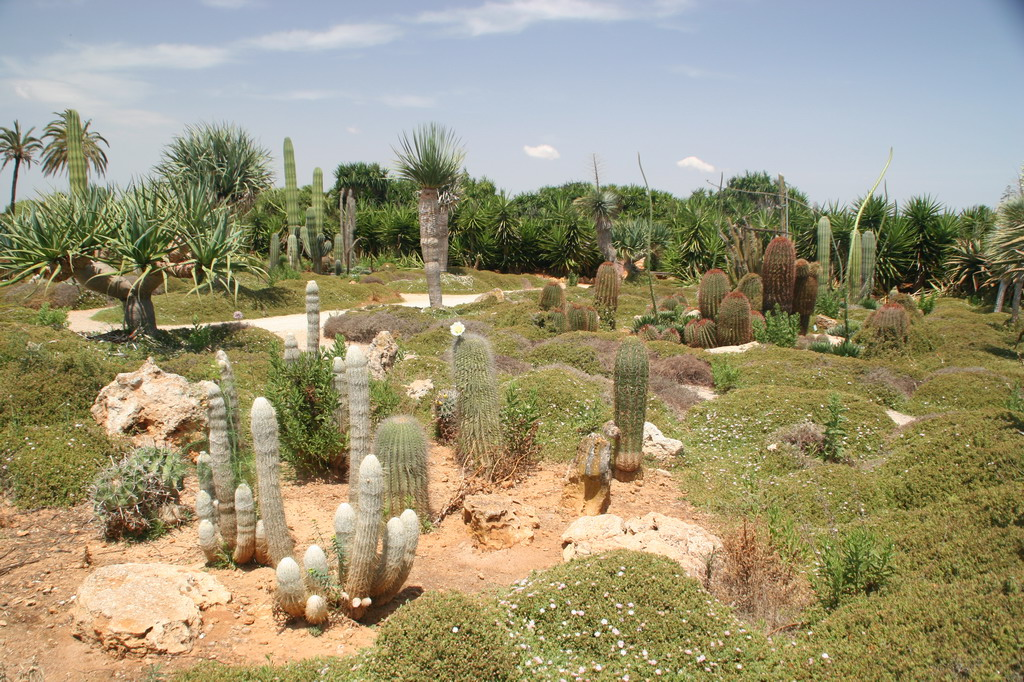 Botanicactus Kakteen